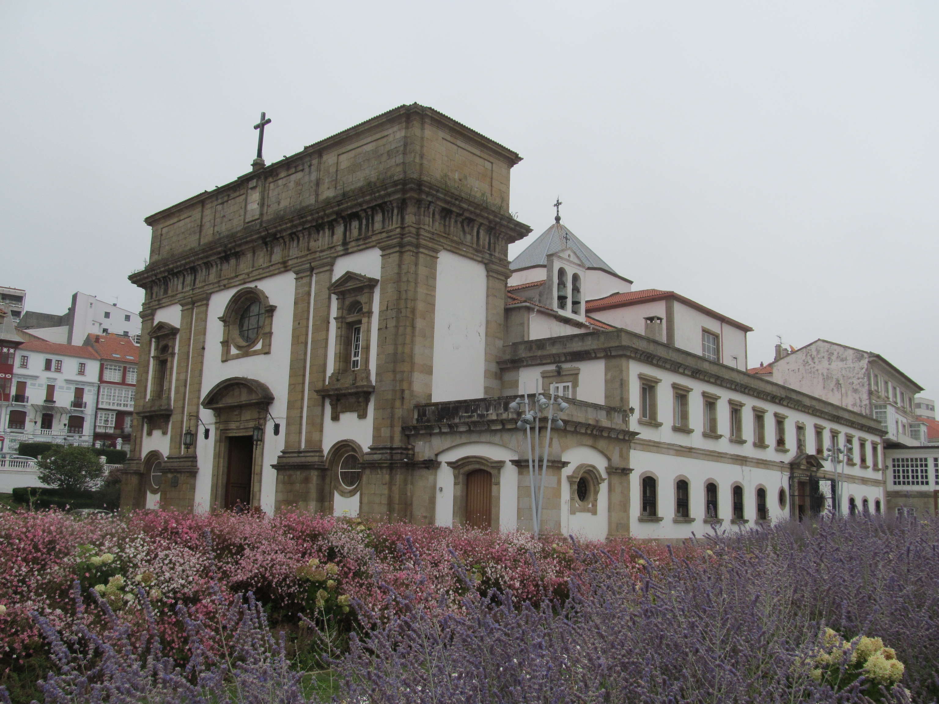 Ferrol - Iglesia Castrense de San Francisco, construida en el siglo XVIII en estilo neoclásico, sobre los restos del antiguo convento franciscano del siglo XVI.